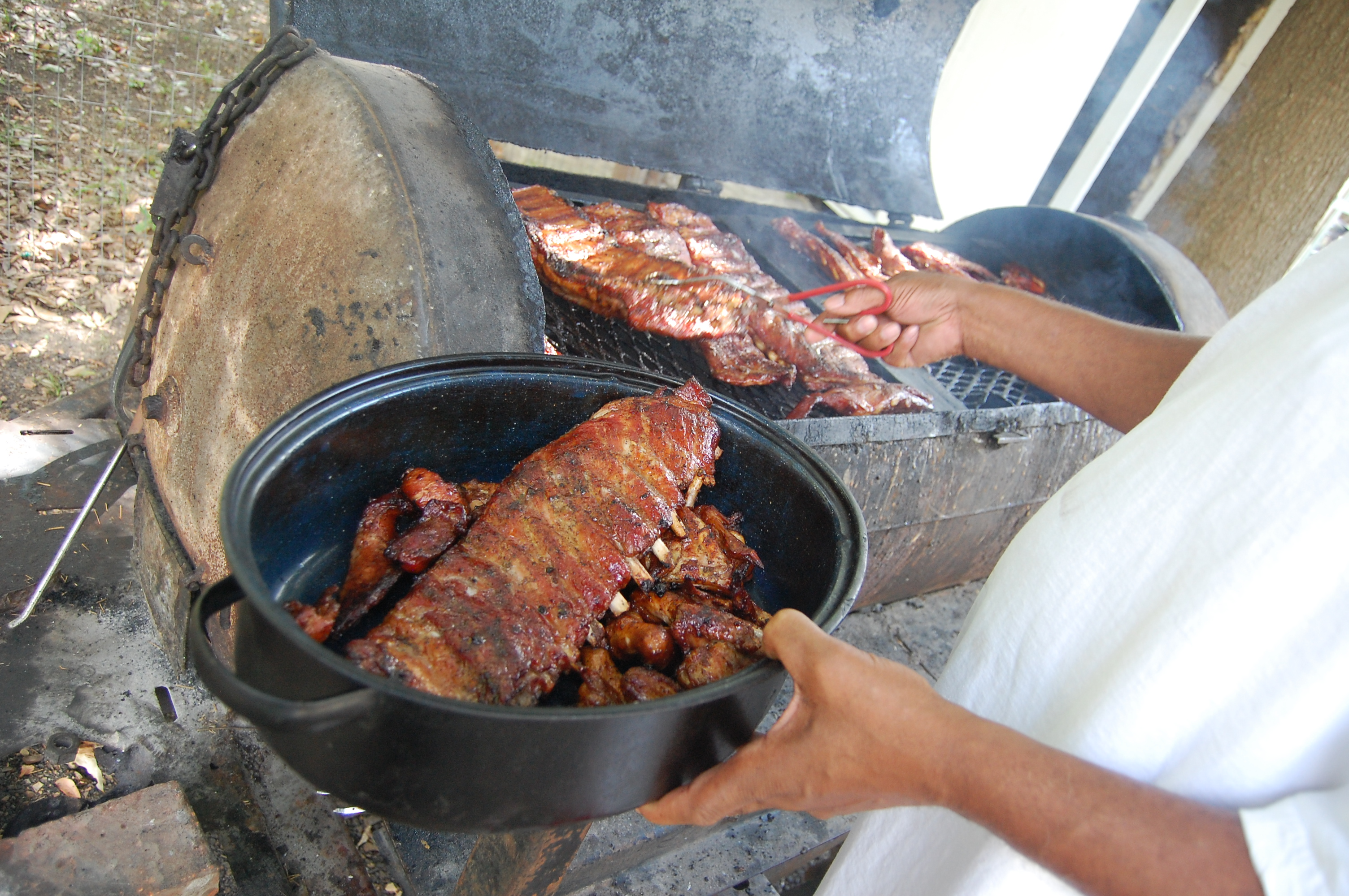 Barbecue-Garen von Spareribs in einem Barrel-Smoker, in „Spooney's Bar-Be-Que“ in Greenwood (Mississippi/USA).